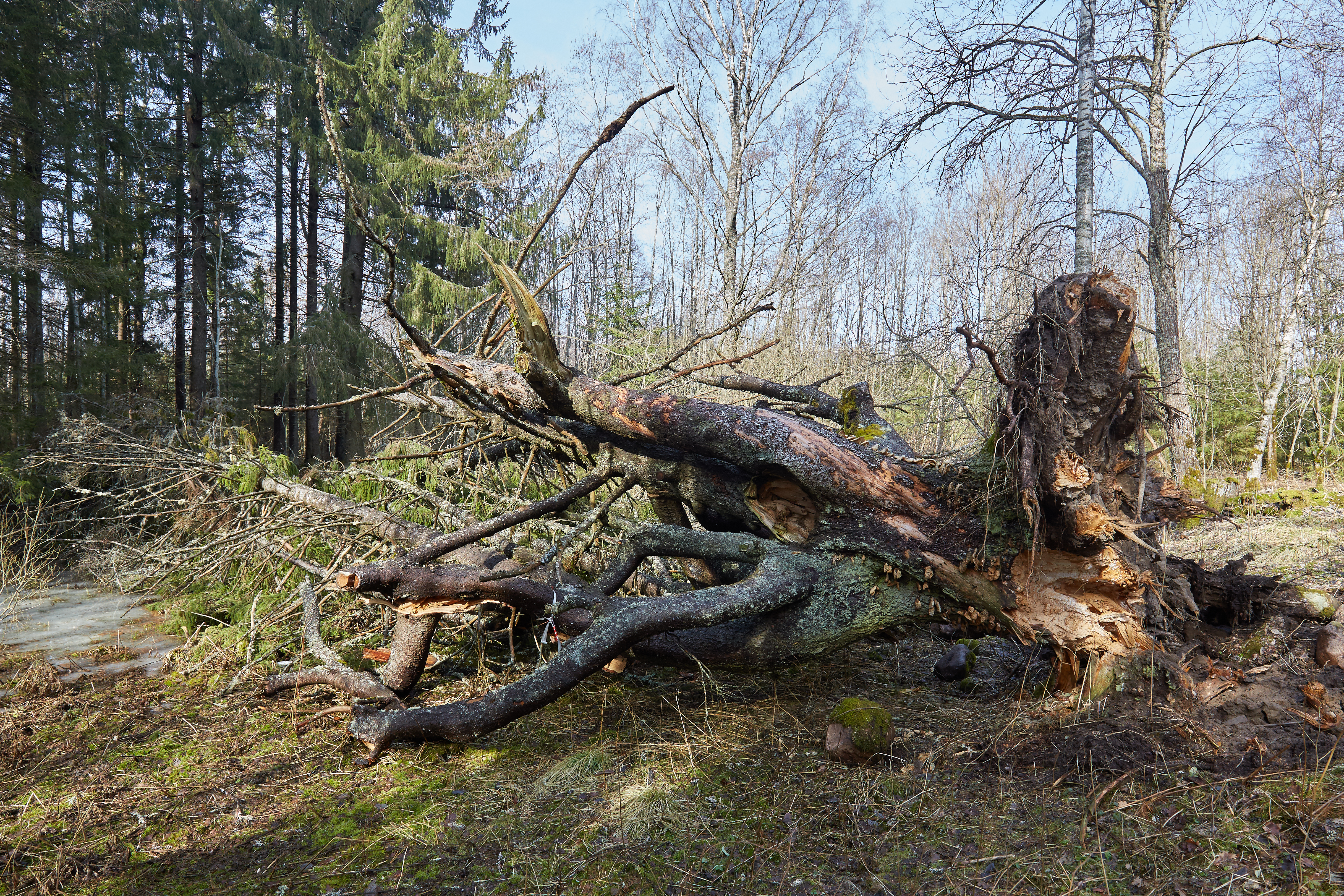 Pältre lühterkuusk 2017. aasta aprillis.